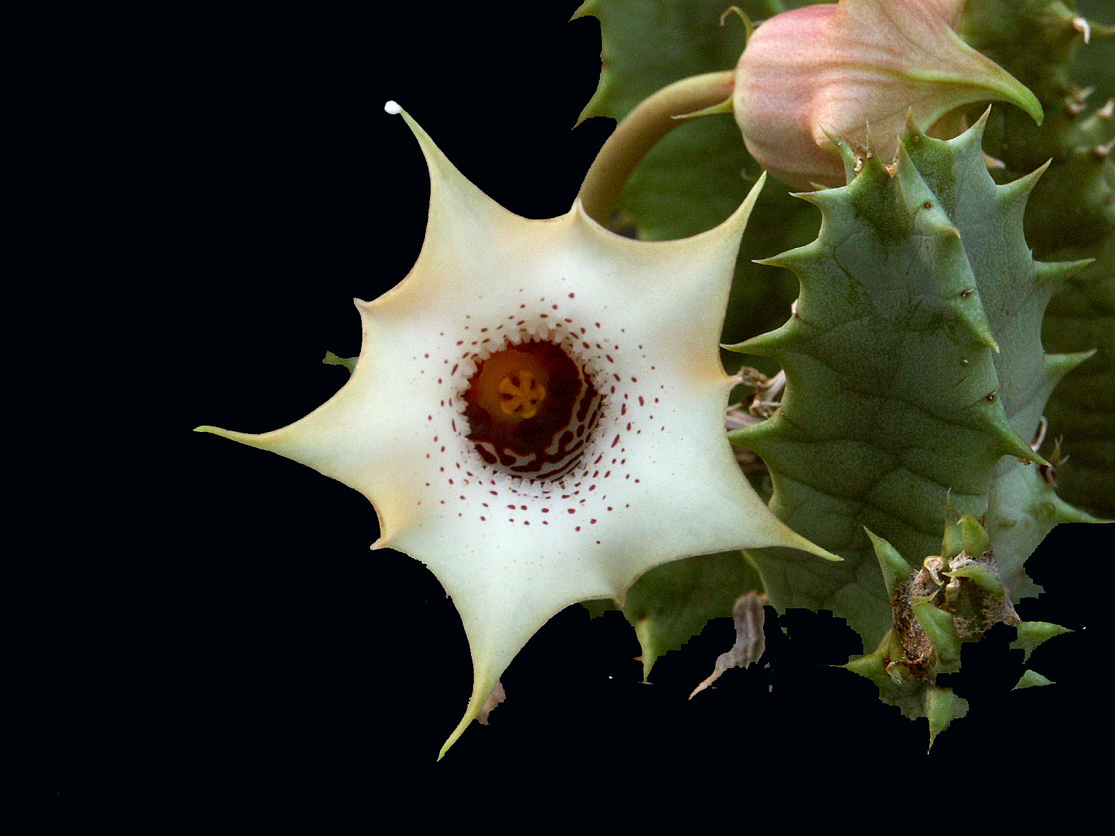 Huernia